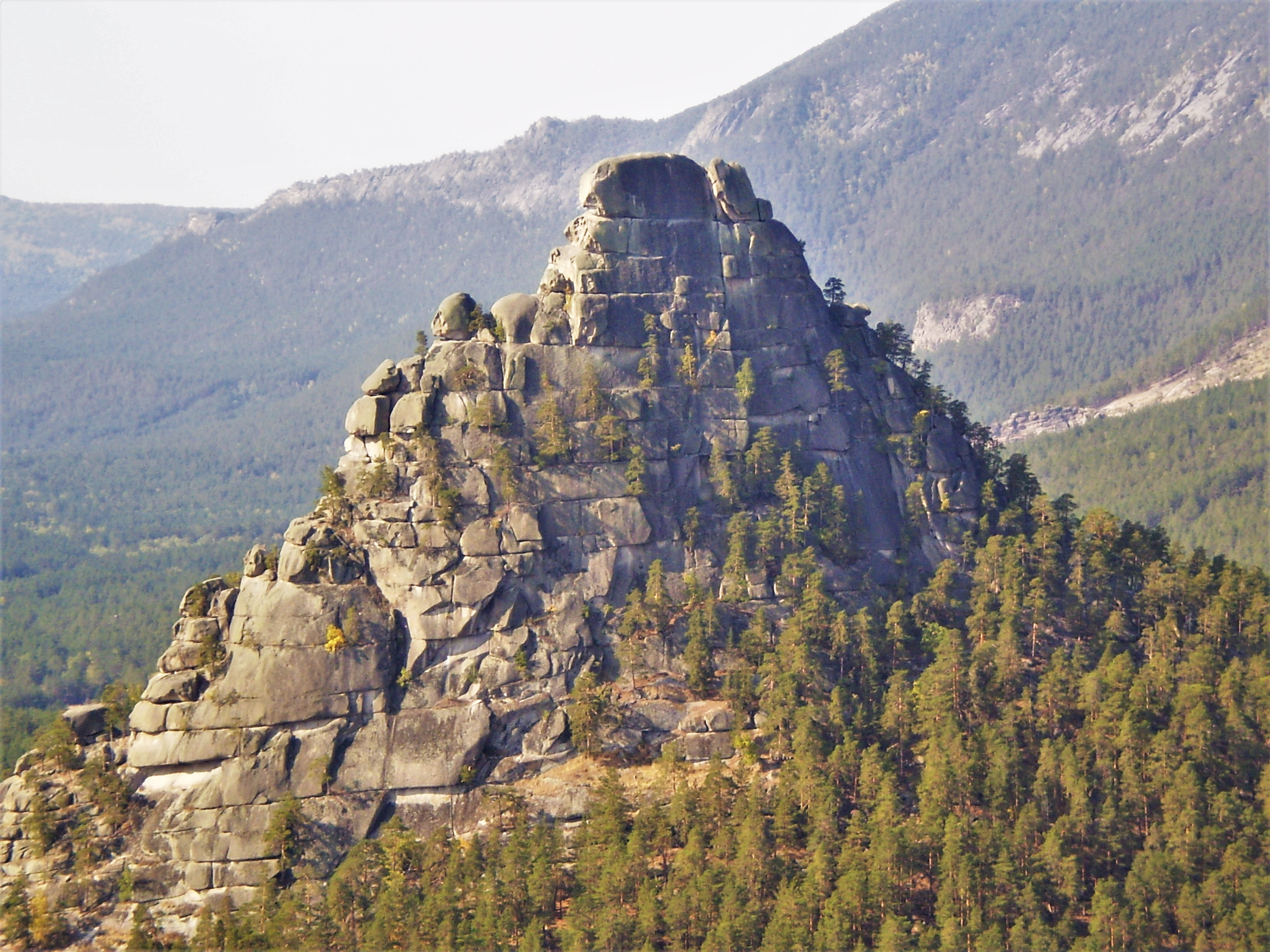 Курорт Боровое